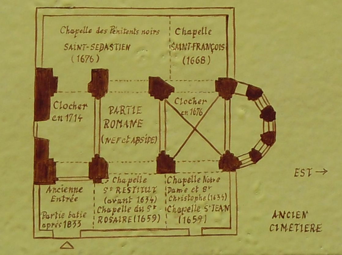 Vinezac - Plan de l'église - Ardèche - France